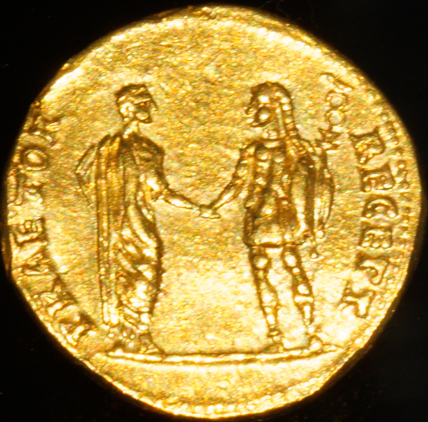 Aureus de Claude frappé à Rome, vers 41-42 ; Avers : tête de Claude laurée à droite TI CLAVD CAESAR AVG PM TR P. Revers : Claude en toge serre la main au prétorien porteur d'enseigne PRAETOR RECEPT